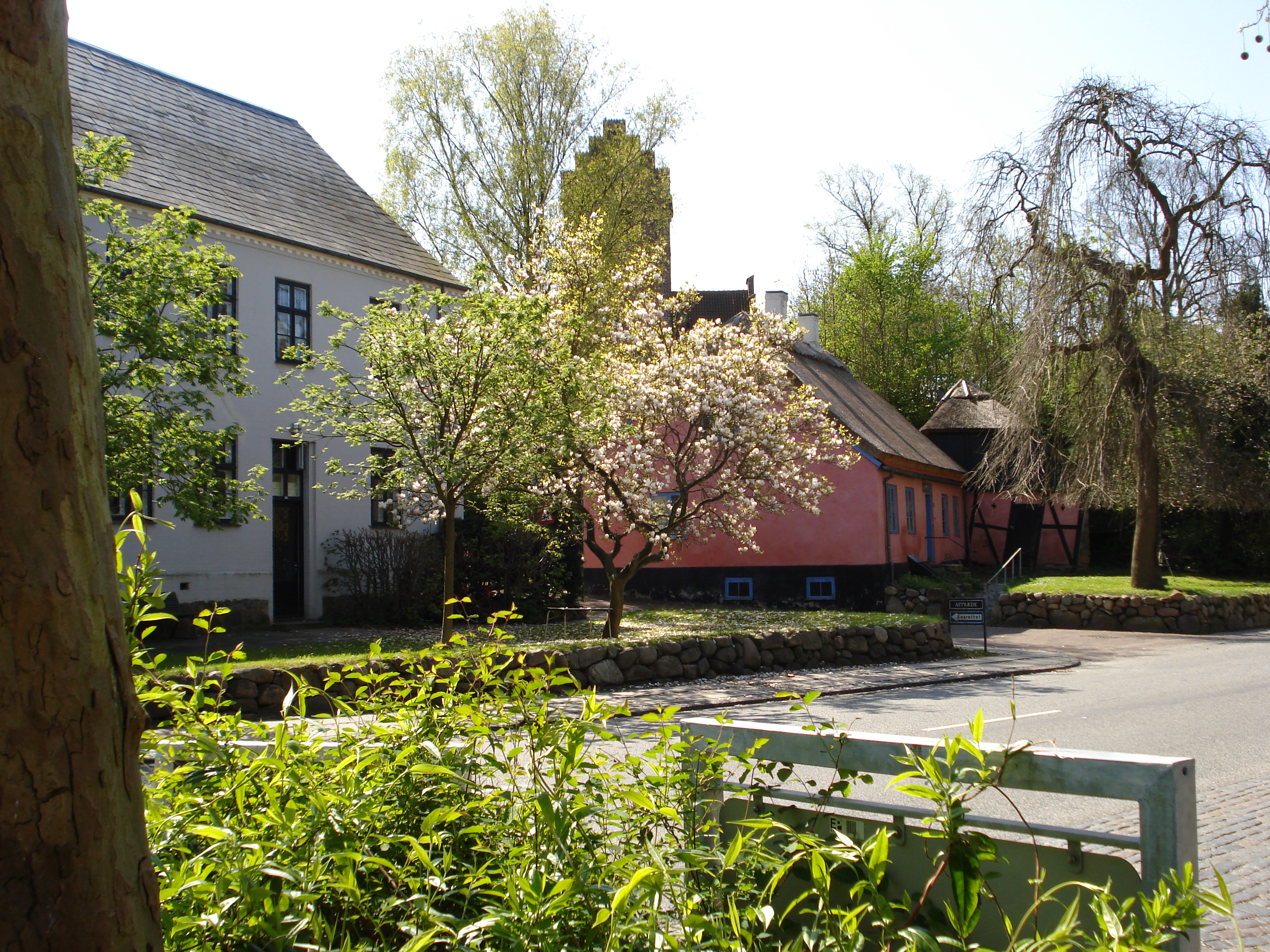 Gammel Lundtoftevej ved Åstræde i Kongens Lyngby. Lyngby Kirke ses i baggrunden